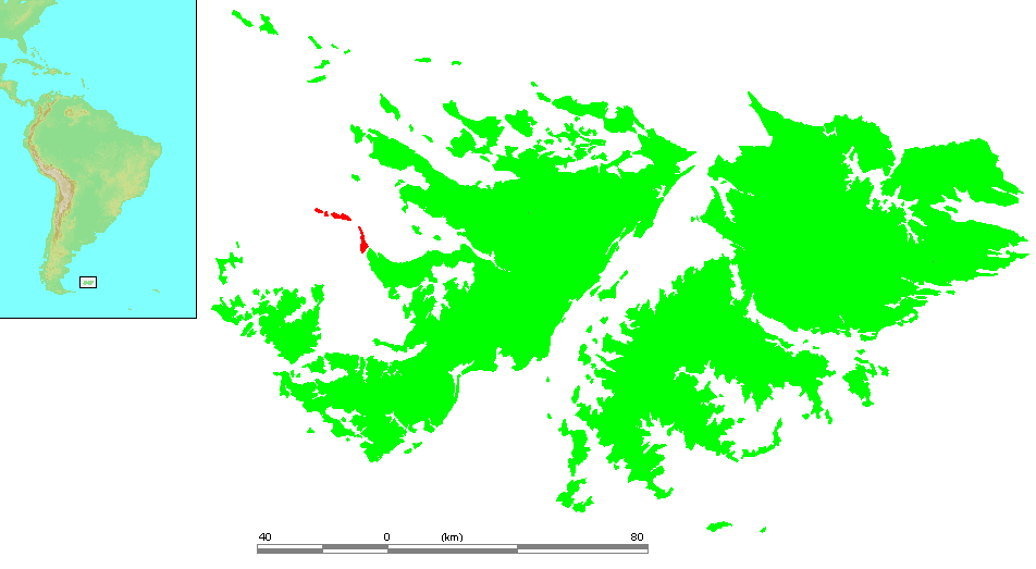 Falkland Islands - Passage Islands.PNG